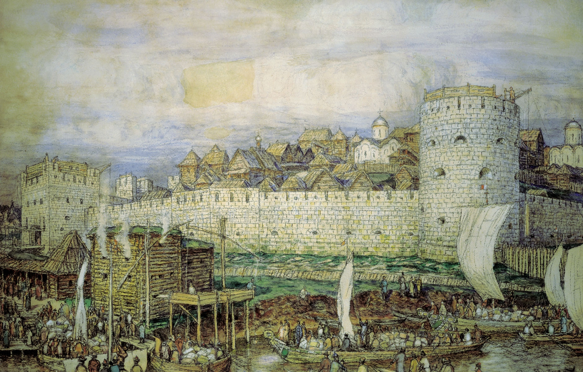 Вероятный вид на Белокаменный Кремль Дмитрия Донского со стороны Боровицких ворот перед нашествием Тохтамыша в 1380 году